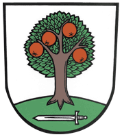 Znak obce Šenov u Nového Jičína.